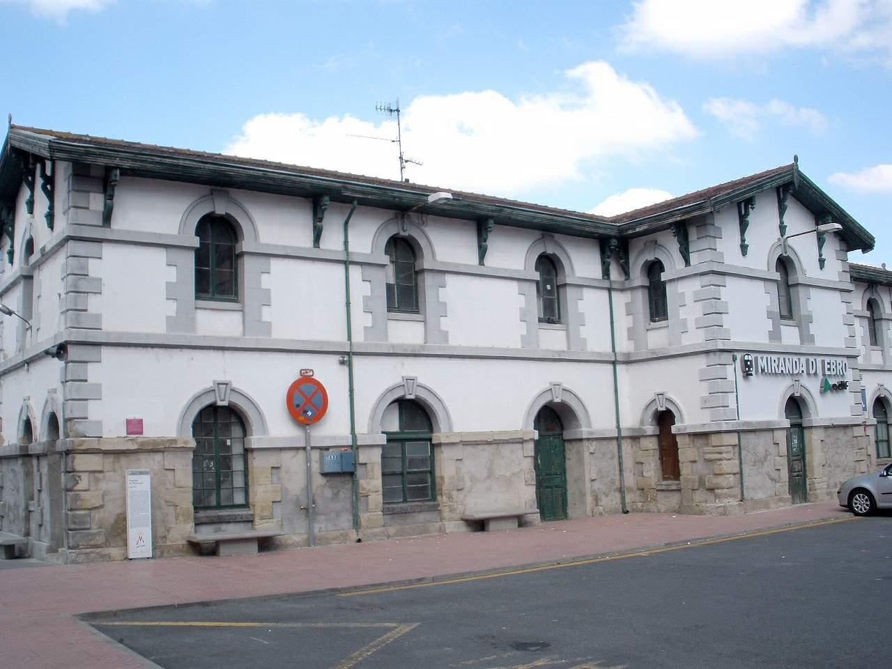 Estación de ferrocarril de Miranda de Ebro.